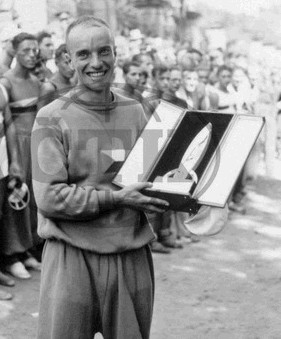 Bohuslav Karlík (1908-1996), československý rychlostní kanoista a vodní slalomář